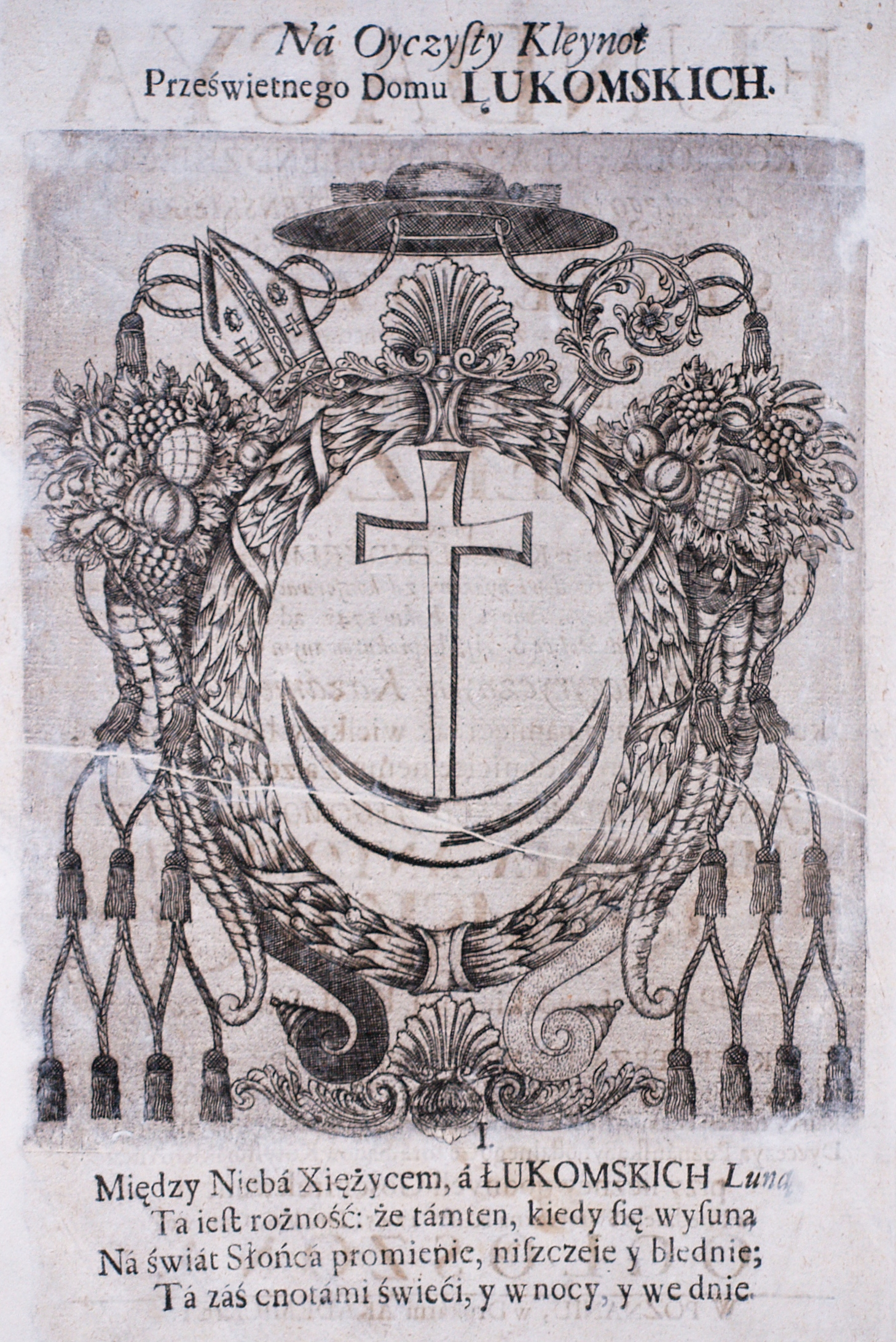 Herb Szeliga opata M.A.Łukomskiego i panegiryczny tekst na jego cześć, w K. Jarmundowicz, Fundacya kośccioła i klasztoru lendzkiego (...) Poznań 1747